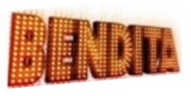 Bendita Argentina - Quinta temporada 2010